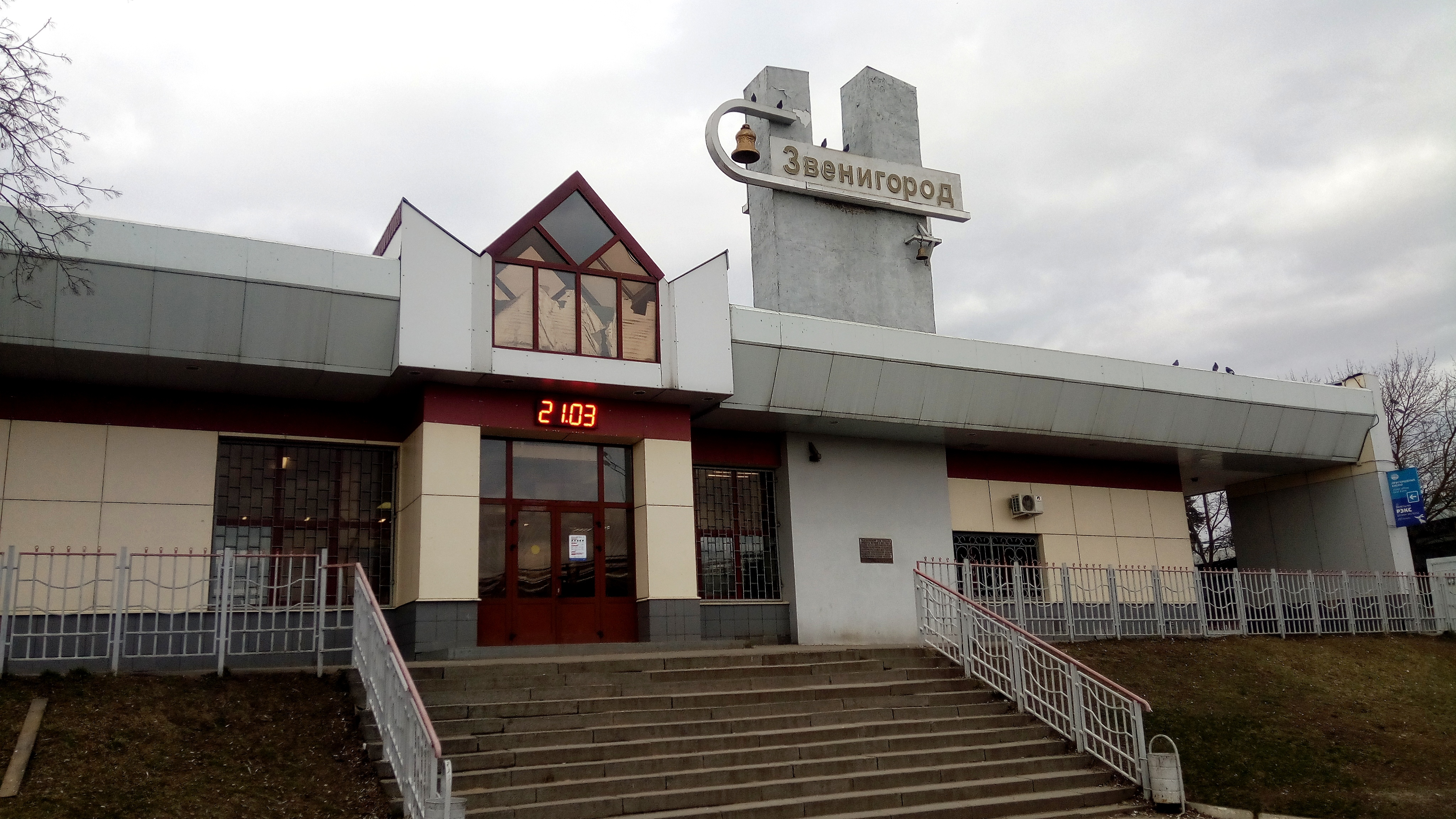 Вокзал в Звенигороде (2020)